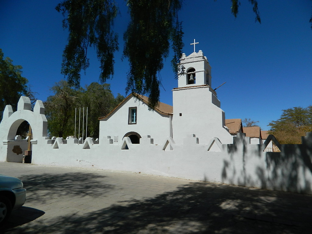 Iglesia construida en el siglo XVI y ubicada a un costado de la plaza, siendo una de la Iglesas más grandes de la Región de Antofagasta, con un estilo andino hecha completamente de Adobe. Además está rodeada por un cerco de este mismo material, levantado en 1978. El envigado es de tablas de algarrobo, amarradas con cintas de cuero, y la techumbre de tablillas de cactus cubiertas con barro y paja. Los muros actuales datan de 1774, a pesar de haber sido reparada entre 1839 y 1843, luego de un incendio. La torre de adobe fue agregada en 1964 en reemplazo a una más antigua construida en madera. This is a photo of a national monument in Chile: 301